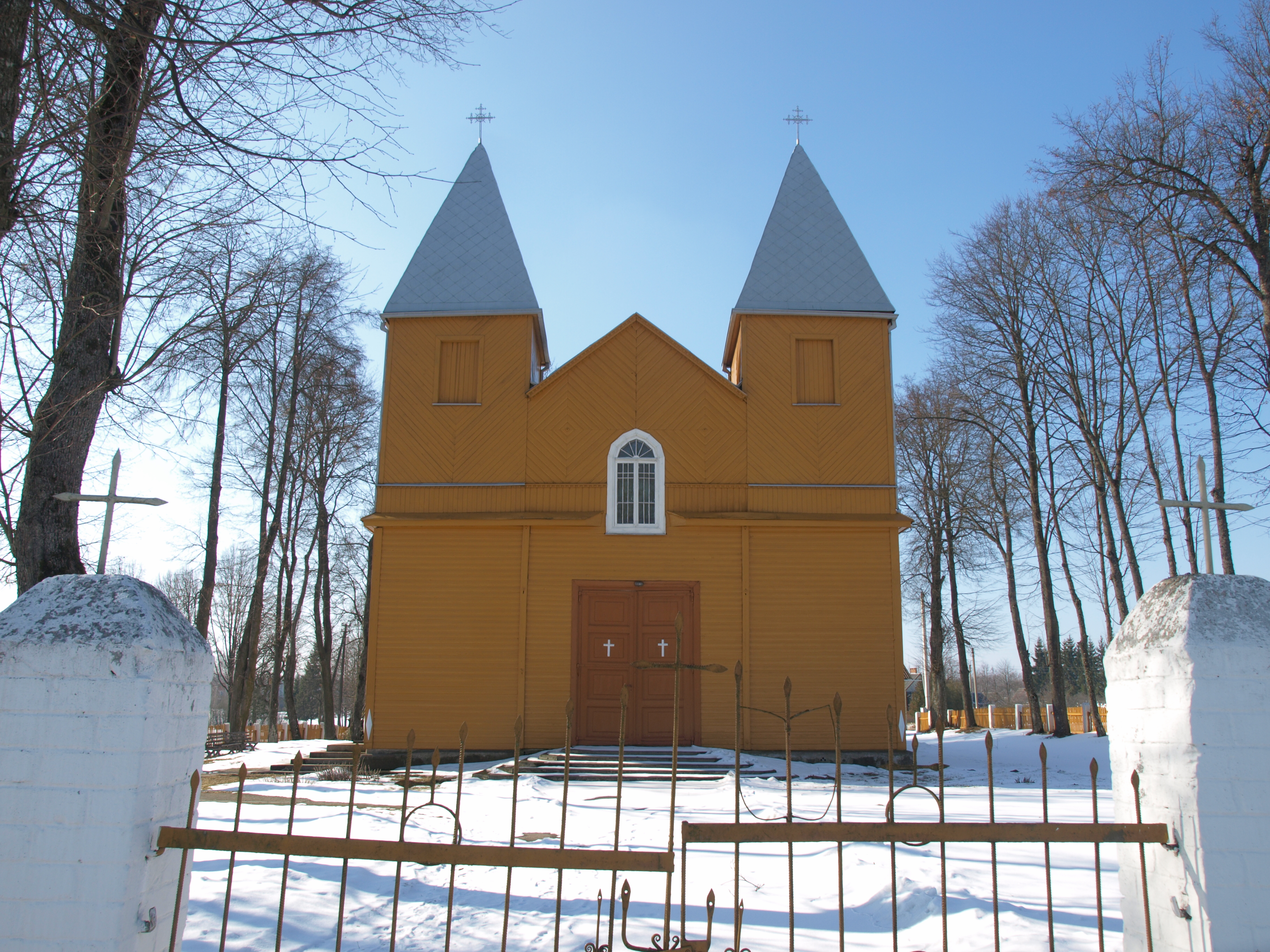 Žilinai church, Varėna district